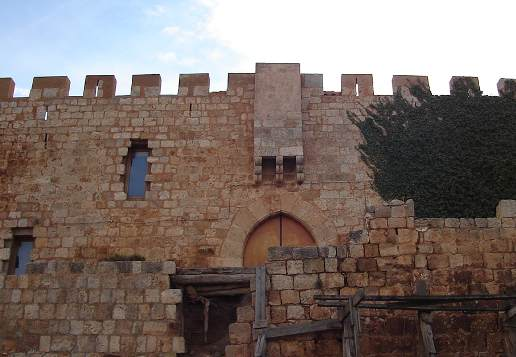 Castillo de Grisel, Grisel castle